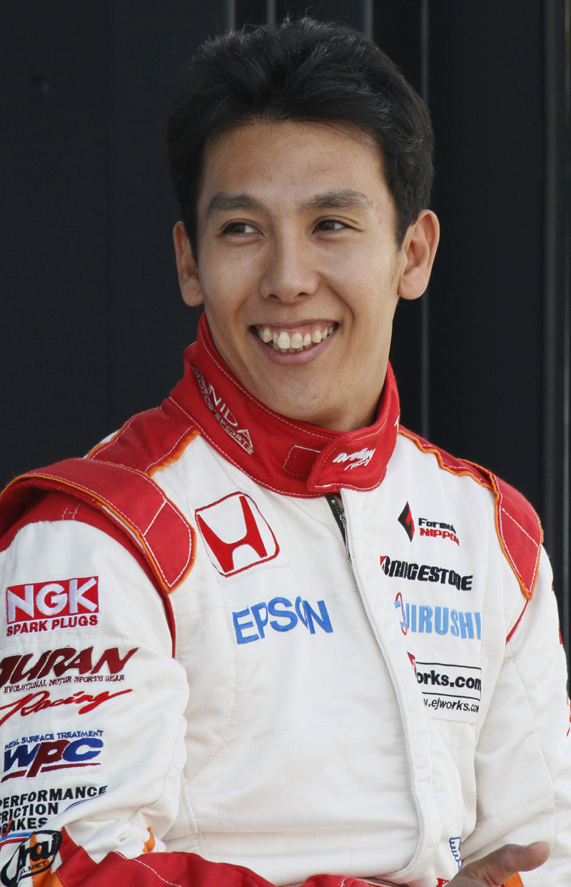 Motorsport Japan 2010: Takashi Kogure (Nakajima Racing / Formula Nippon)